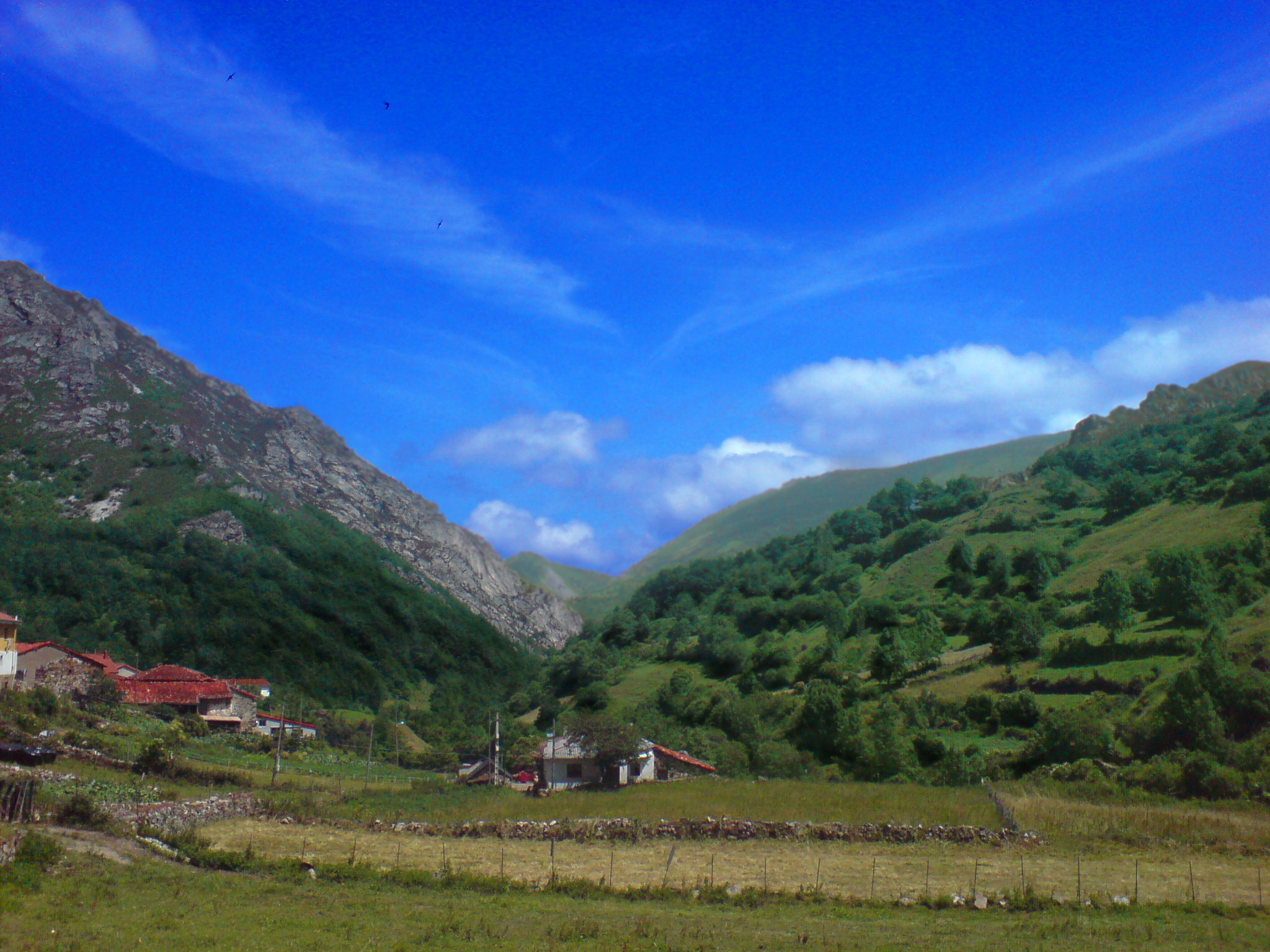 Valles de Somiedo.